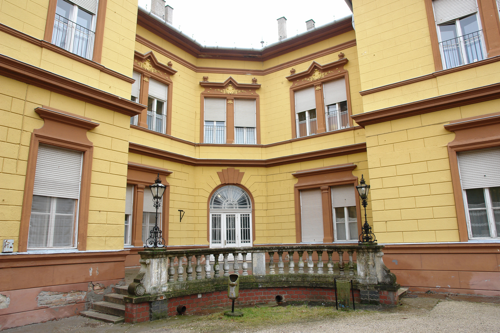 v. Pallavicini-kastély, Tüdőszanatórium (Mosdós, Petőfi S. u. 4 .) This is a photo of a monument in Hungary. Identifier: 8015